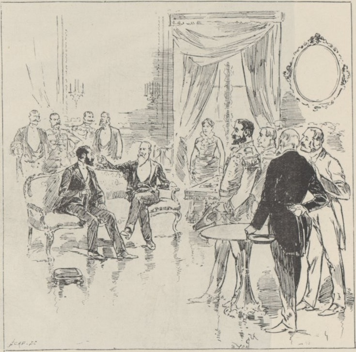 AIX-LES-BAINS. — Visite du Président Carnot a l'Empereur du Brésil. — (Dessin de M. Parys).